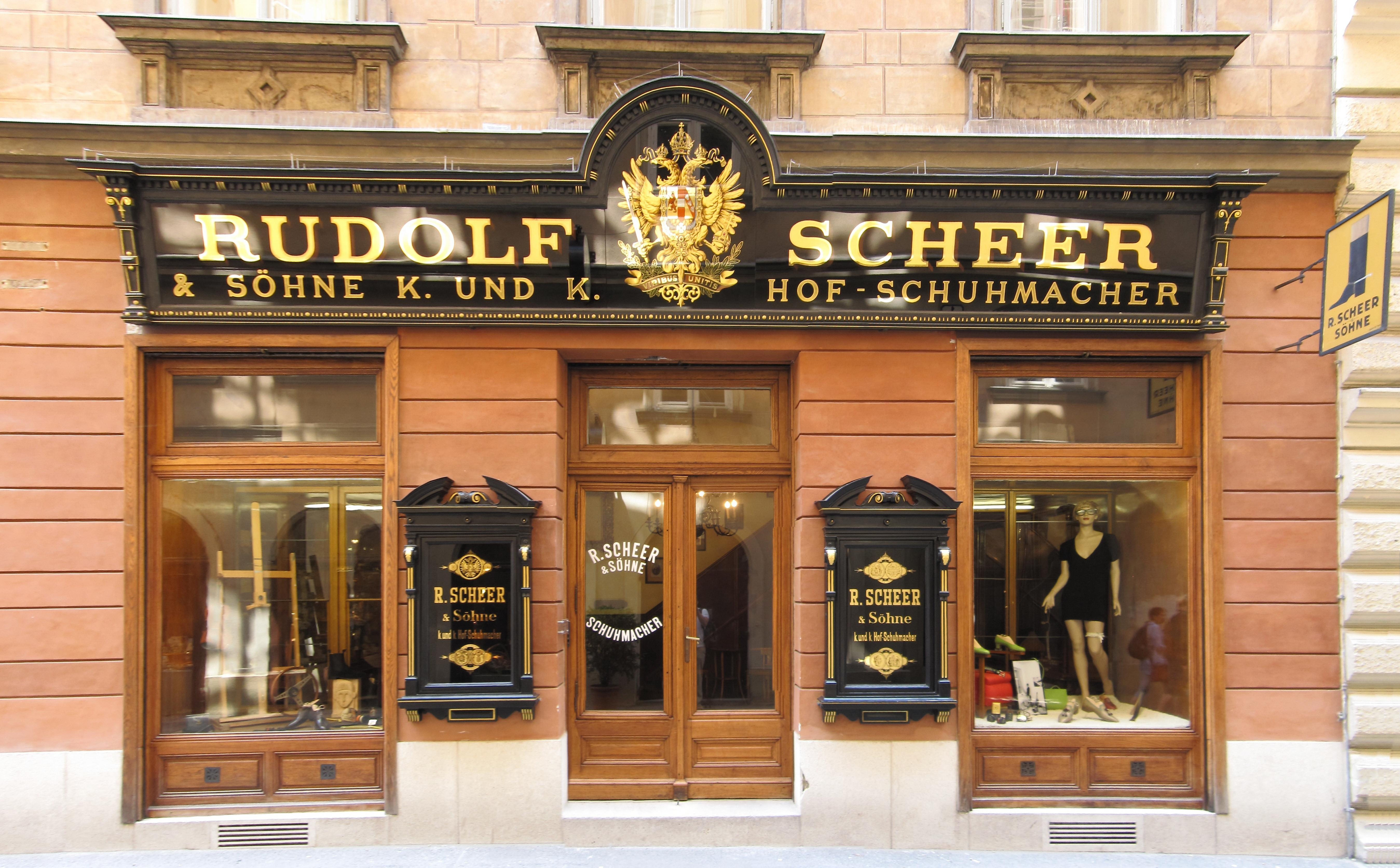 Rudolf Scheer & Söhne in Vienna's I. district